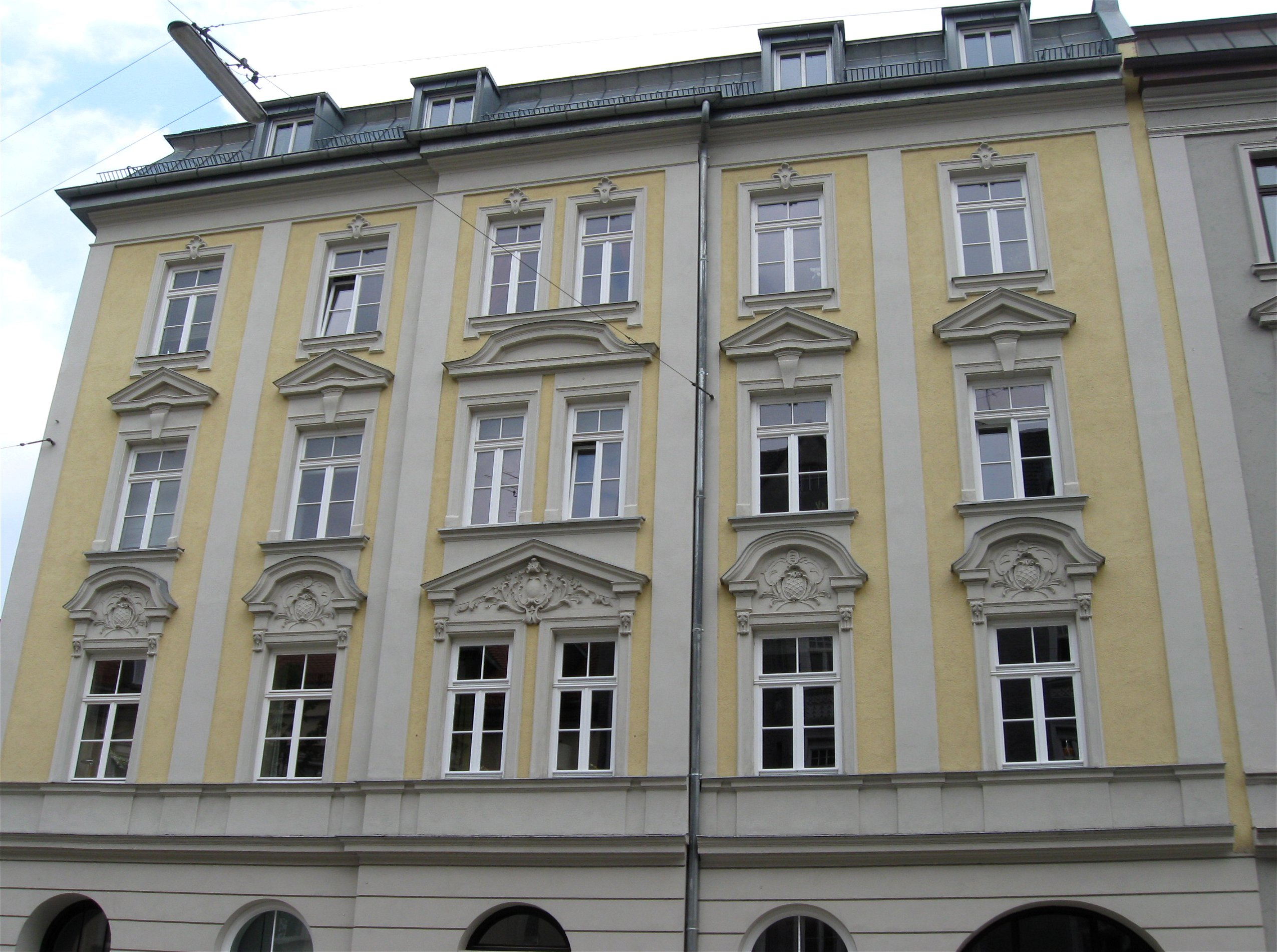 Breisacher Straße 10; Mietshaus, neubarock, reich gegliederter und stuckierter Eckbau, 1896-97 von Hans Thaler; Gruppe mit Nr. 8